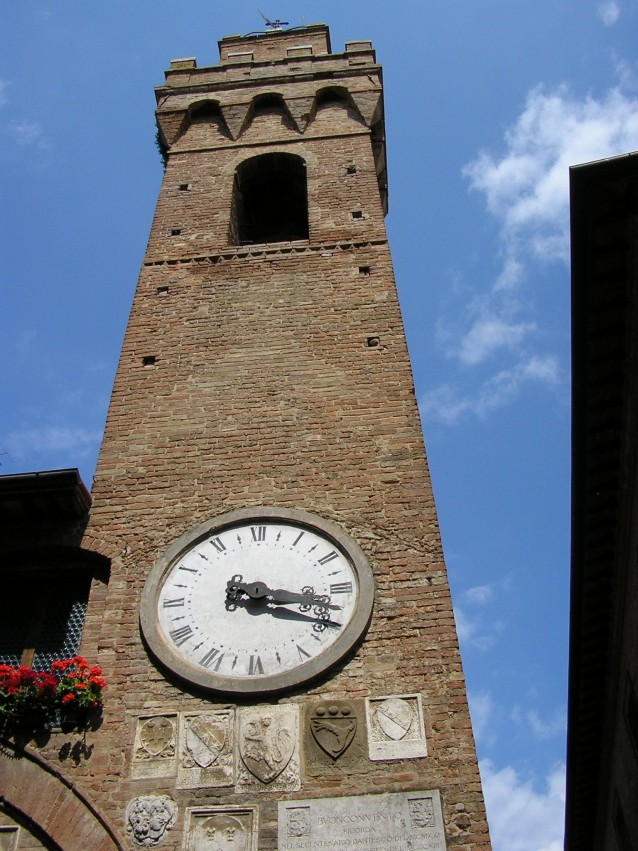 Immagine della torre campanaria di Buonconvento (SI)